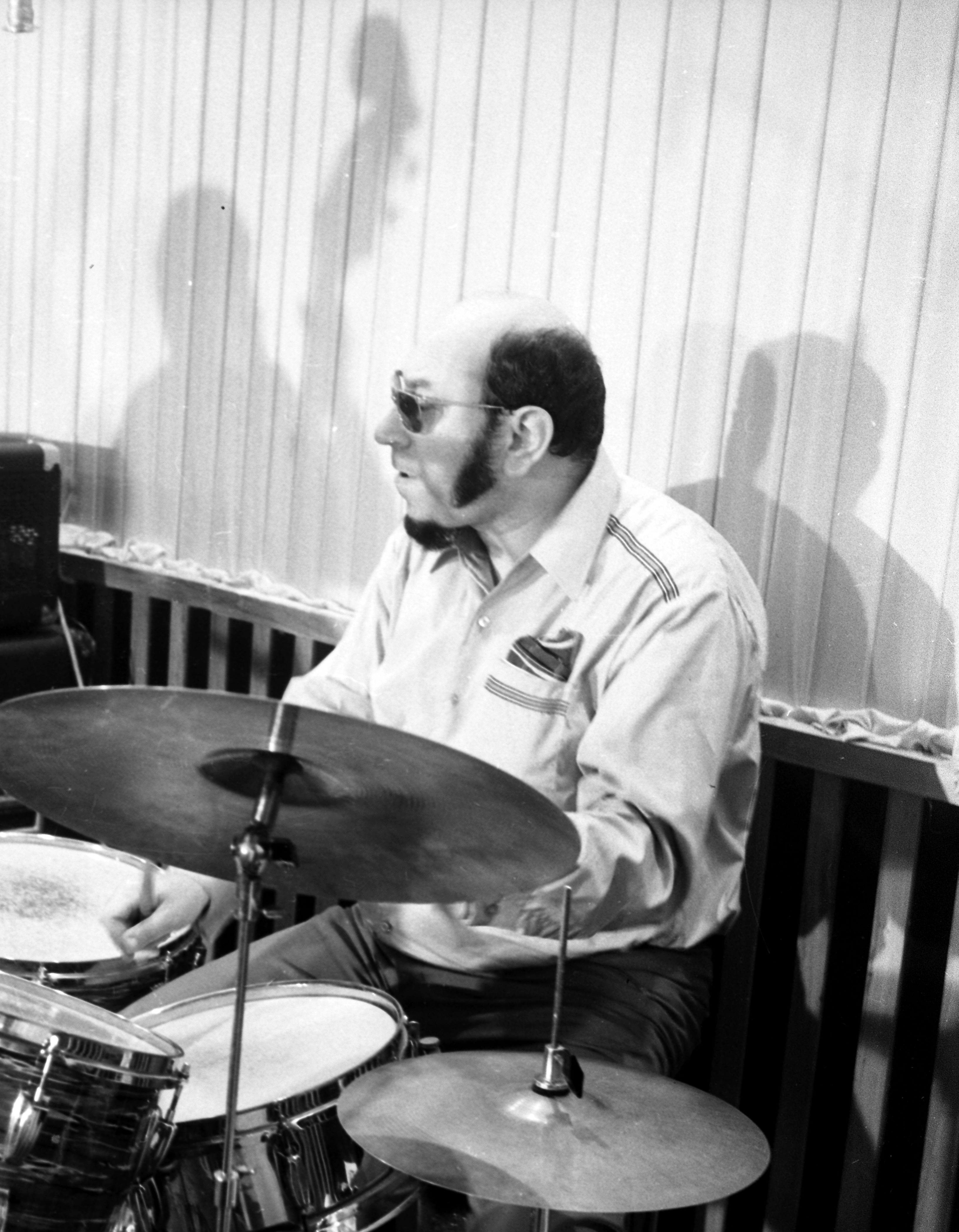 Kovács Gyula („Mr. Dob”), Budapest, 1927. december 26. – Budapest, 1992. február 13.) korának legismertebb, legvirtuózabb, legkeresettebb dzsesszdobosa volt.